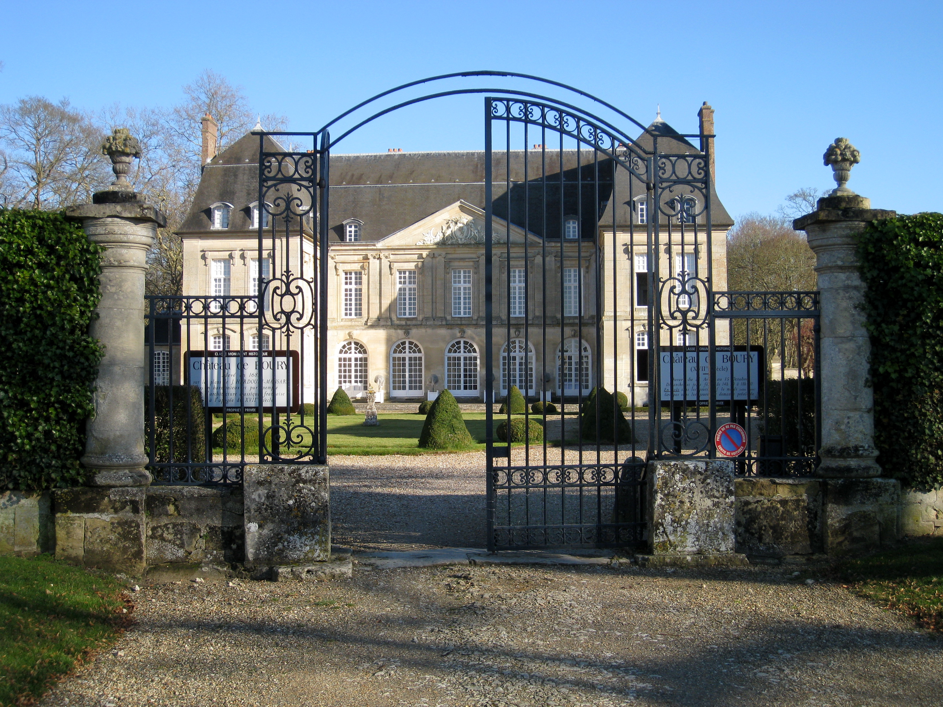 Chateau de Boury en Vexin, Oise, France